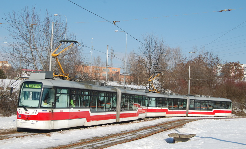 Česky: Souprava VarioLF2 na cvičné jízdě v Líšni.